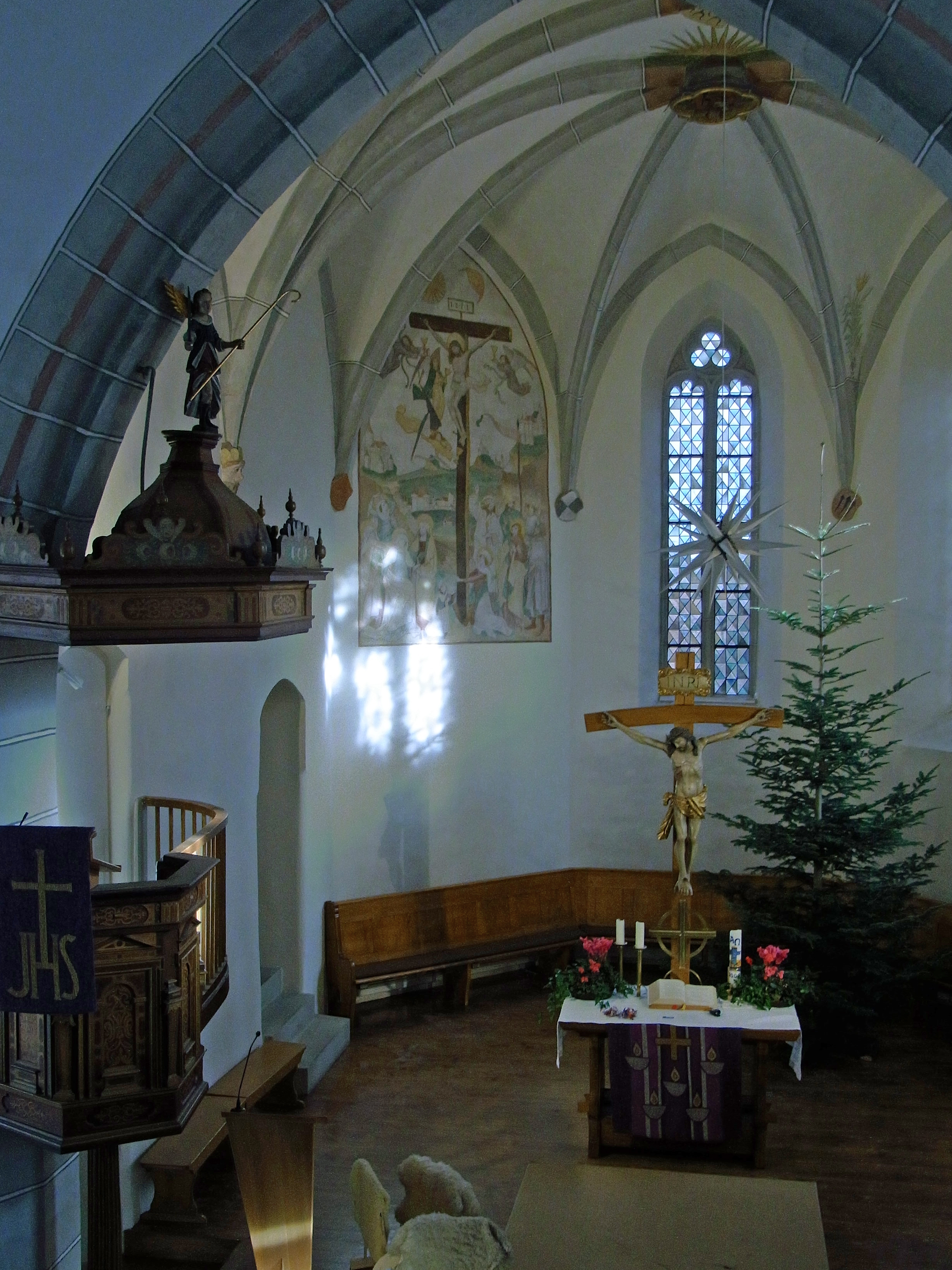 Engstlatt Peterskirche Chor mit spätgotischem Wandgemälde, Renaissancce-Kanzel, und Altarkreuz des 17. Jahrhunderts